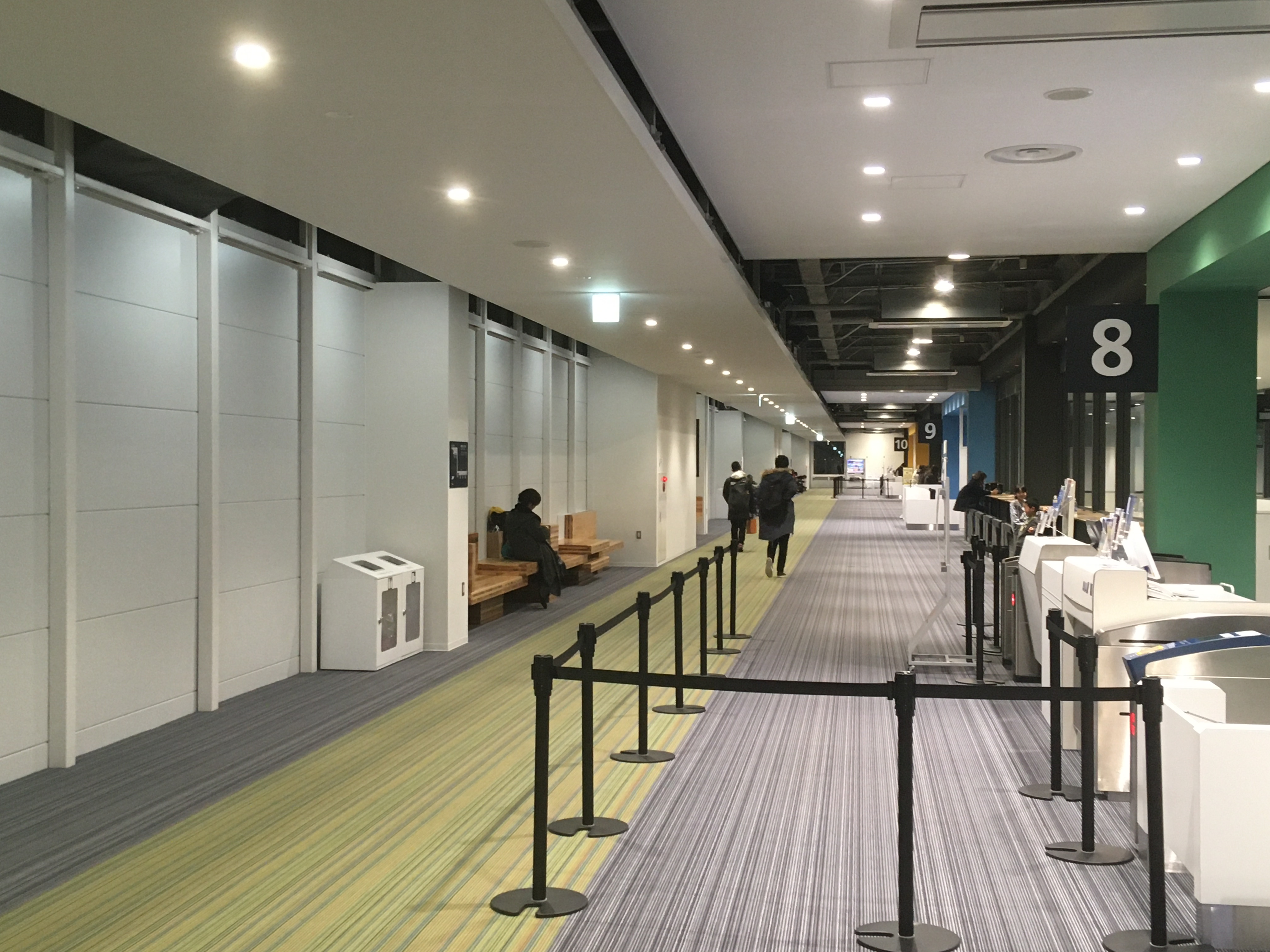 仙台空港 ピア棟 8-10番搭乗口